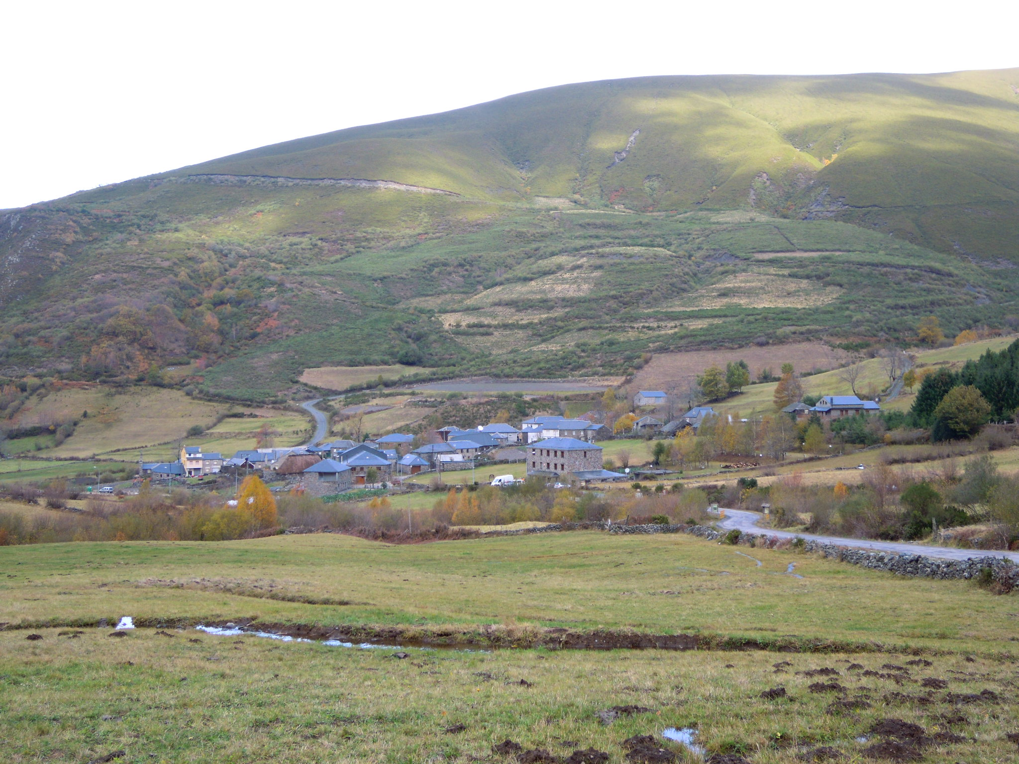 Vista xeral de Valouta (Candín, provincia de León)